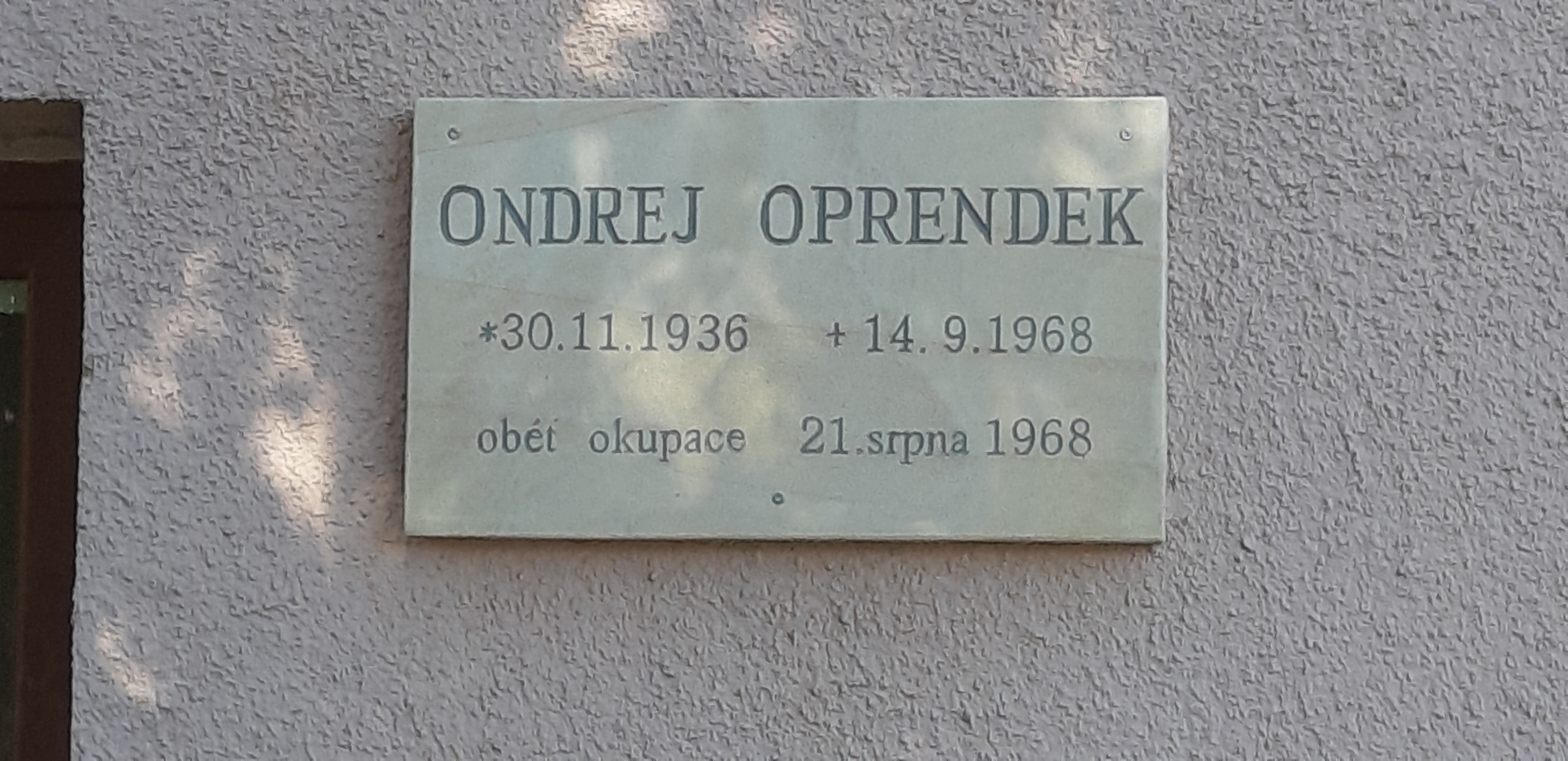 Pamětní deska Ondreje Oprendeka na obecním úřadě ve Velemíně